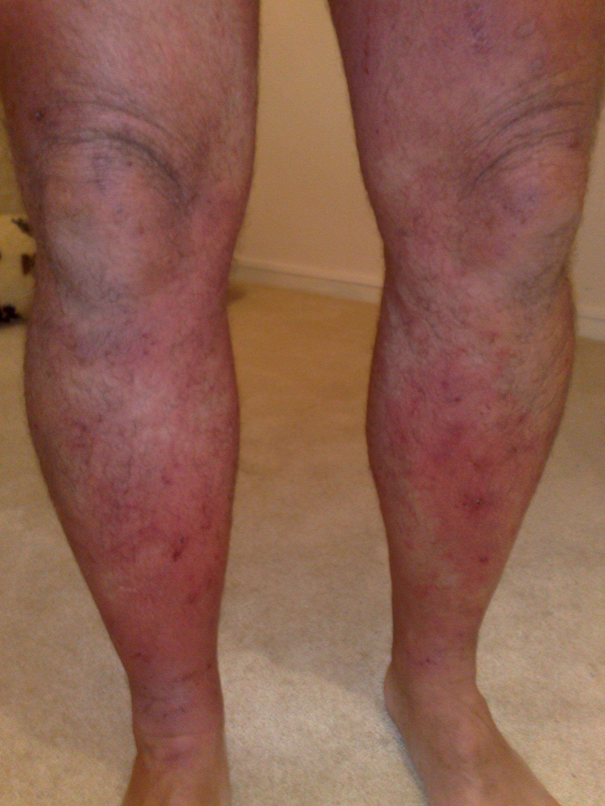 Na snoeiwerkzaamheden aan Hedera waartussen de Gifsumak ook groeit!!